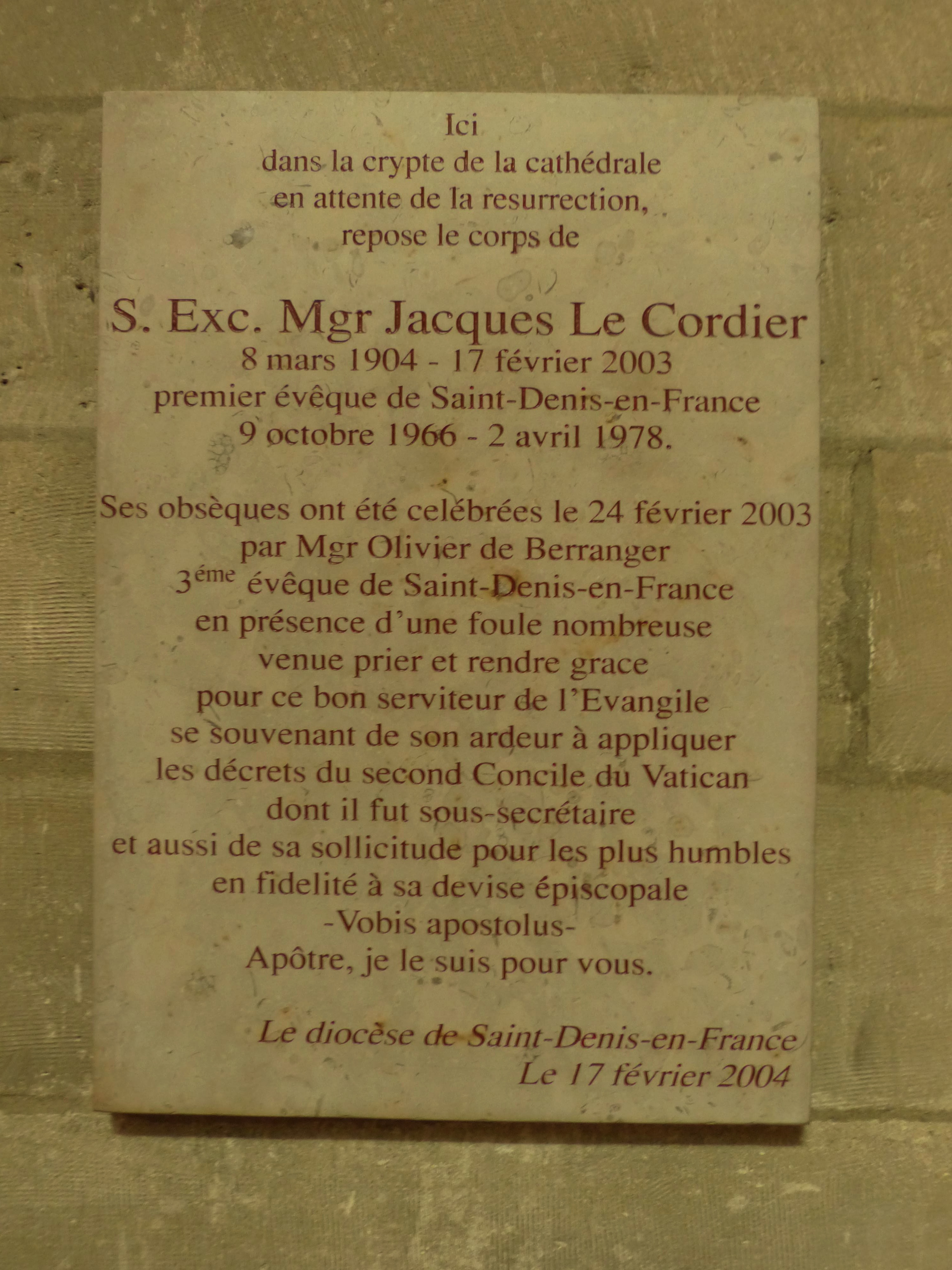 Cathédrale de Saint-Denis (France). Plaque funéraire de Mgr Jacques Le Cordier, premier évêque du diocèse de Saint-Denis.